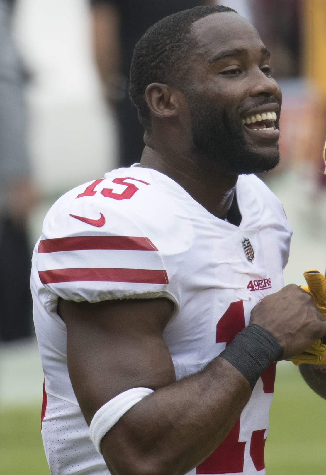 49ers at Redskins 10/15/17